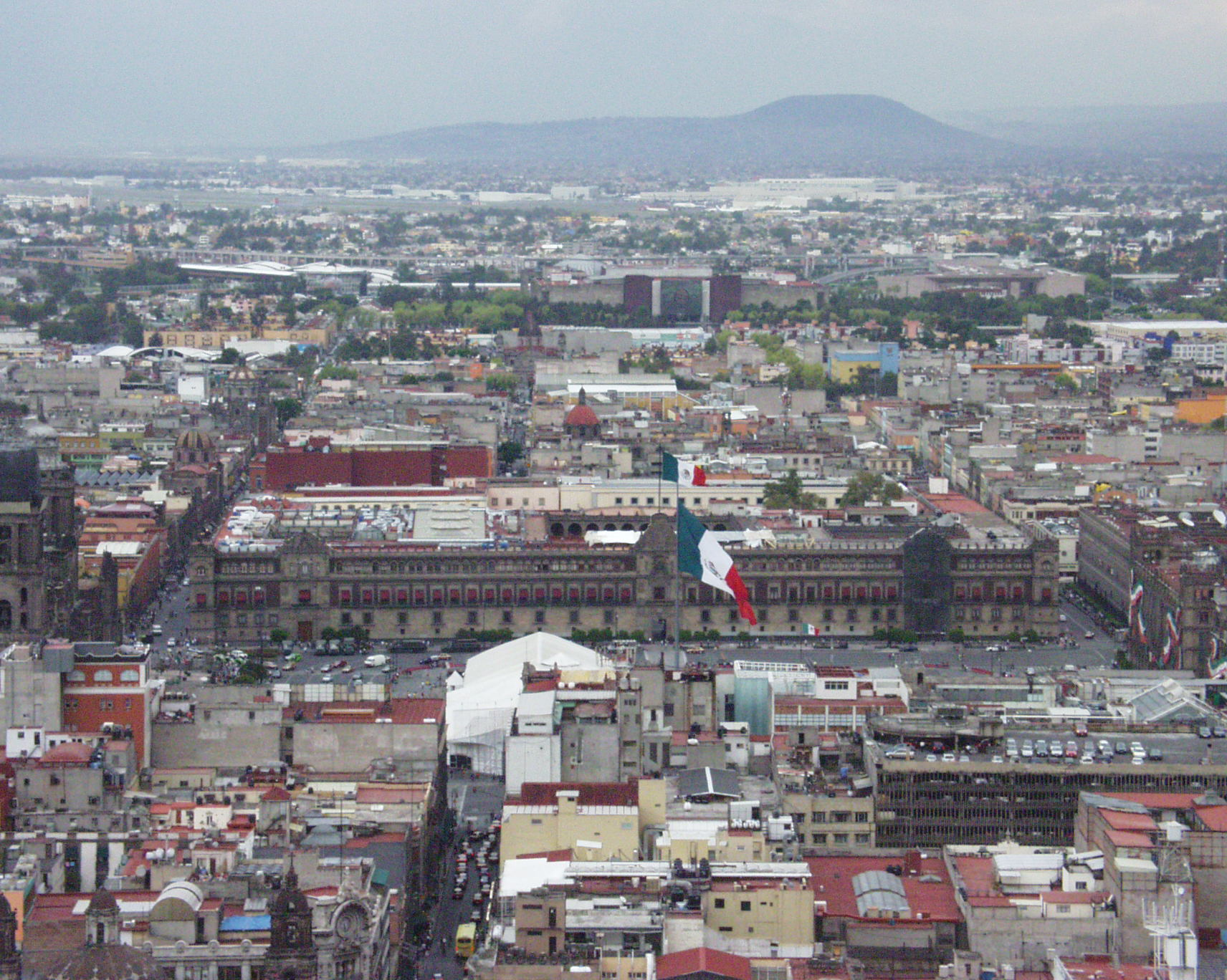 Zócalo vu depuis la Torre latinoamericana à Mexico.